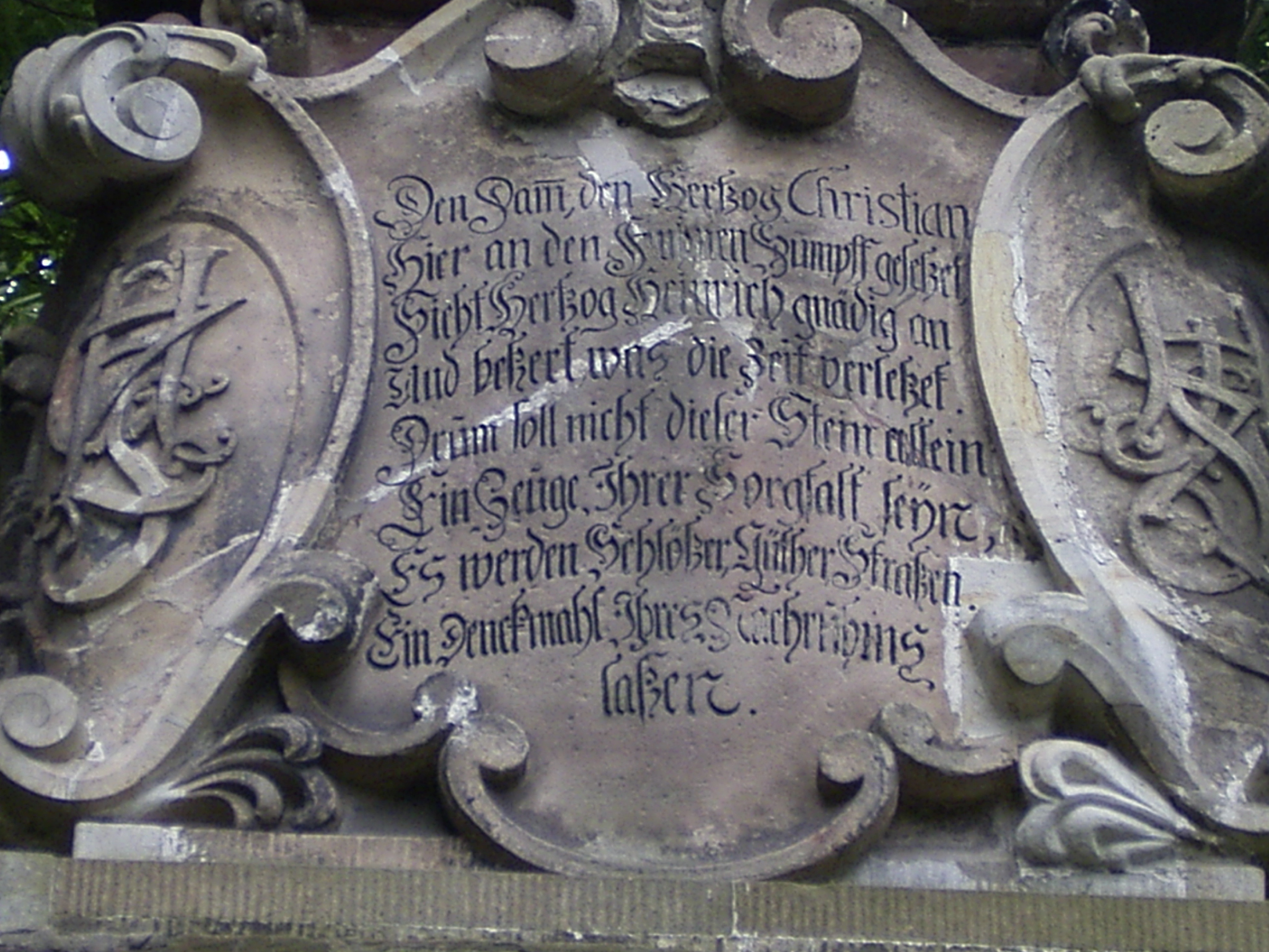 Denkmal Theurer Christian Radegast Anhalt